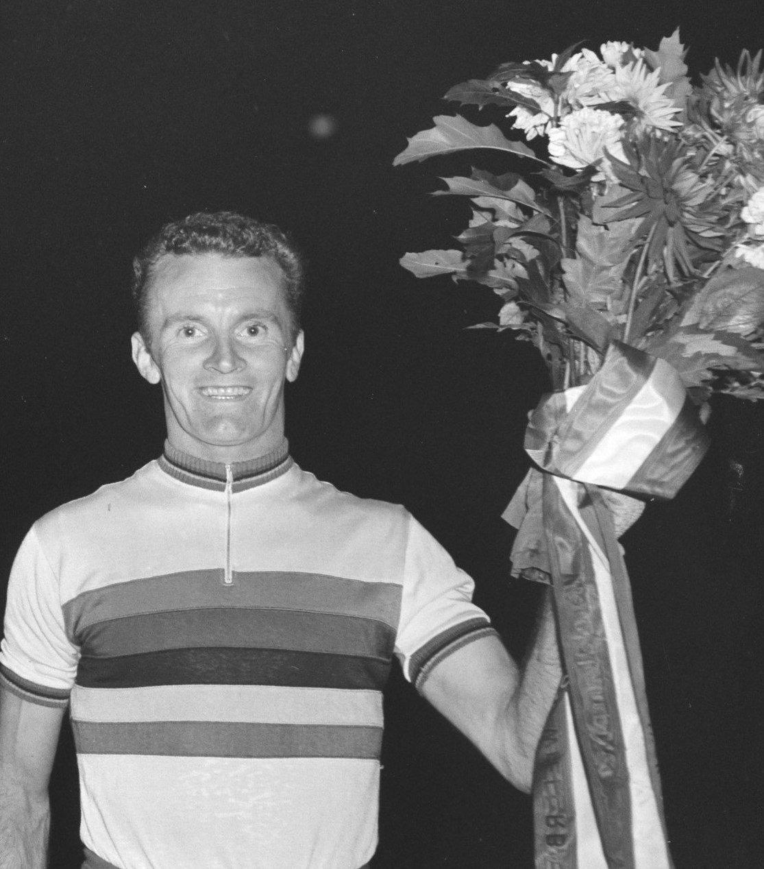 Collectie / Archief : Fotocollectie Anefo Reportage / Serie : [ onbekend ] Beschrijving : Revanches wereldkampioen wielrennen Amsterdam. Van links Maspes, Roussau, Mahn, French Datum : 5 september 1956 Locatie : Amsterdam, Noord-Holland Trefwoorden : Revanches, WIELRENNEN, wereldkampioenen Persoonsnaam : FRENCH Fotograaf : Bilsen, Joop van / Anefo Auteursrechthebbende : Nationaal Archief Materiaalsoort : Negatief (zwart/wit) Nummer archiefinventaris : bekijk toegang 2.24.01.04 Bestanddeelnummer : 907-9839